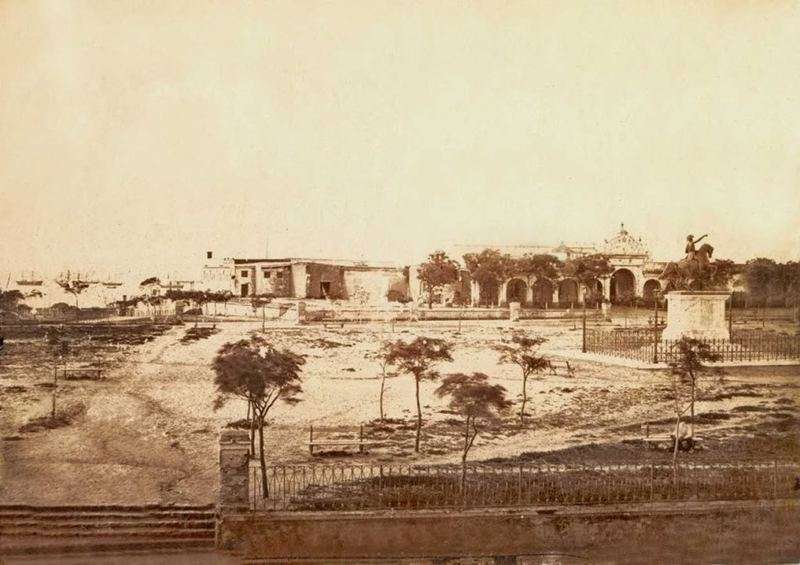 Campo de Marte luego de 1862, cuando se inauguró el Monumento al General San Martín. Se ven unos pocos árboles, y al fondo, sobre la actual calle Arenales, el Cuartel del Retiro, demolido en 1891.